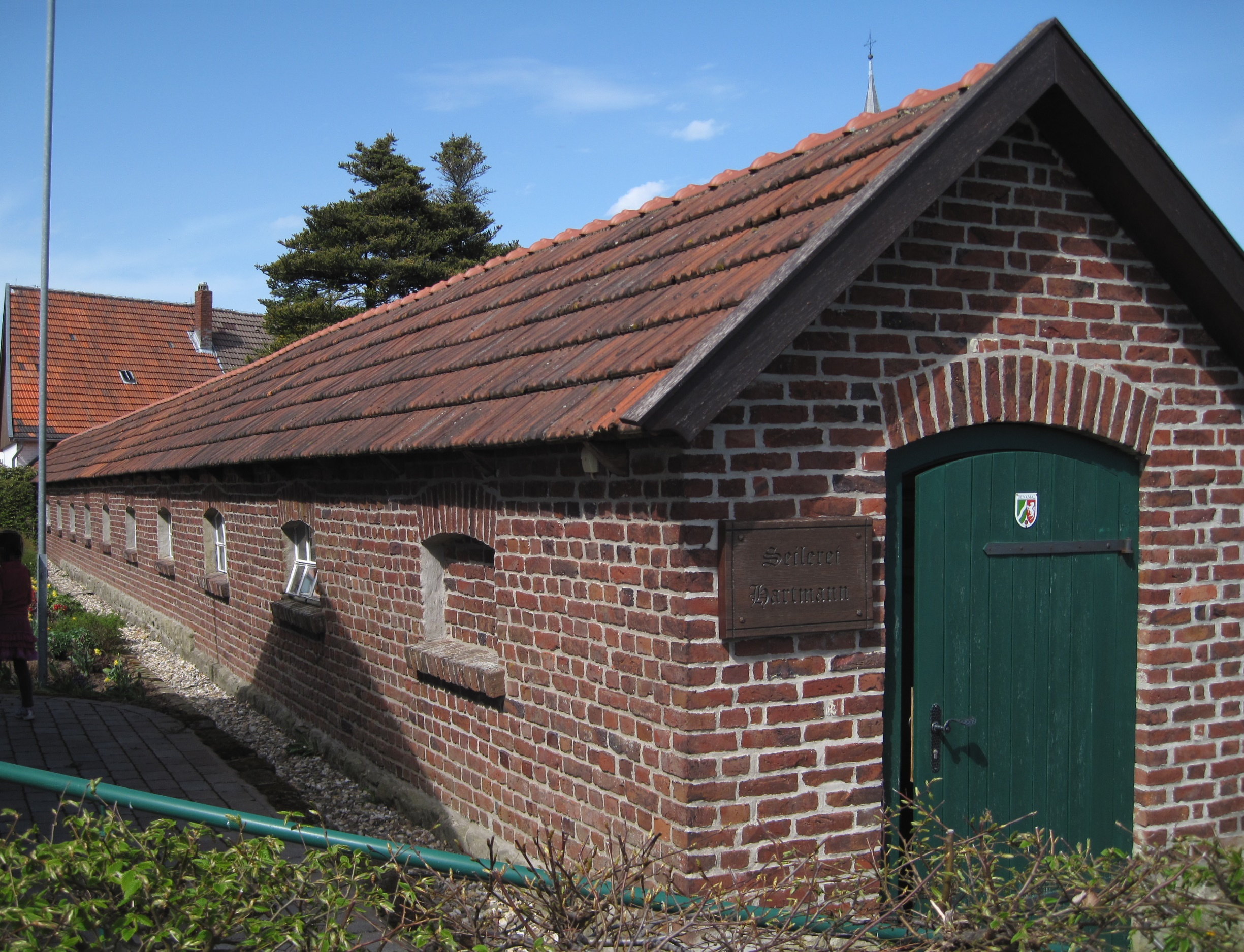 Seilerei Hartmann, Alte Seilerei, Stadtmauerweg/Am Hexenturm in Rüthen. This image shows a heritage building in Germany, located in the North Rhine-Westphalian city Rüthen (no. unbekannt).